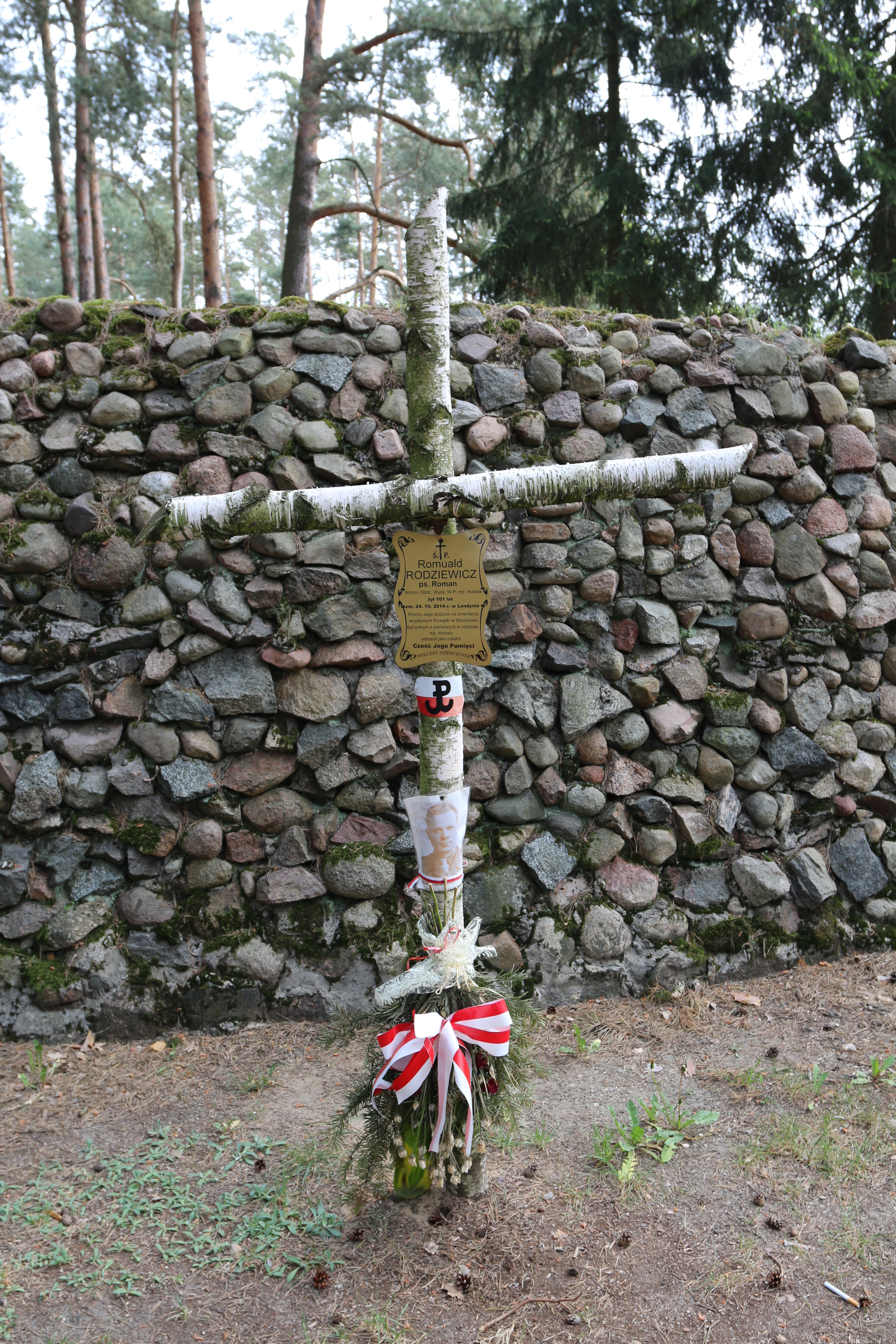 Krzyż w Szańcu Hubala upamiętniający Romualda Rodziewicza